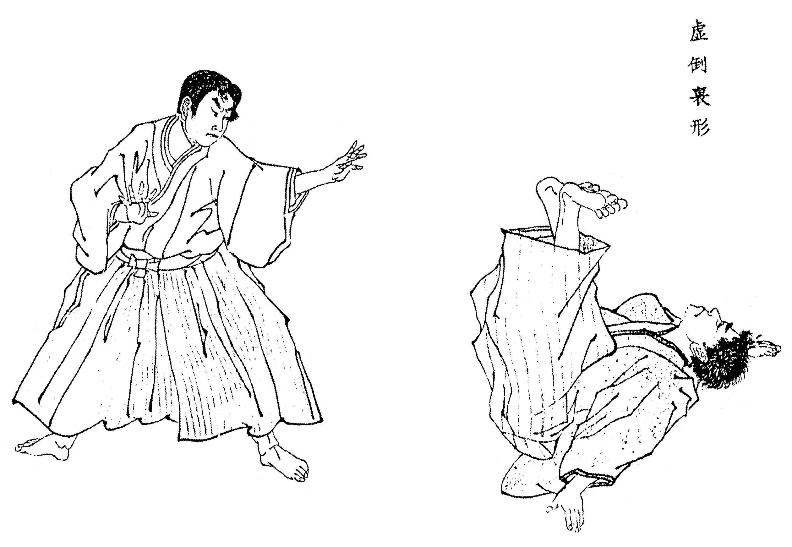 起倒流の形、虚倒(こだおれ)。投げた瞬間。